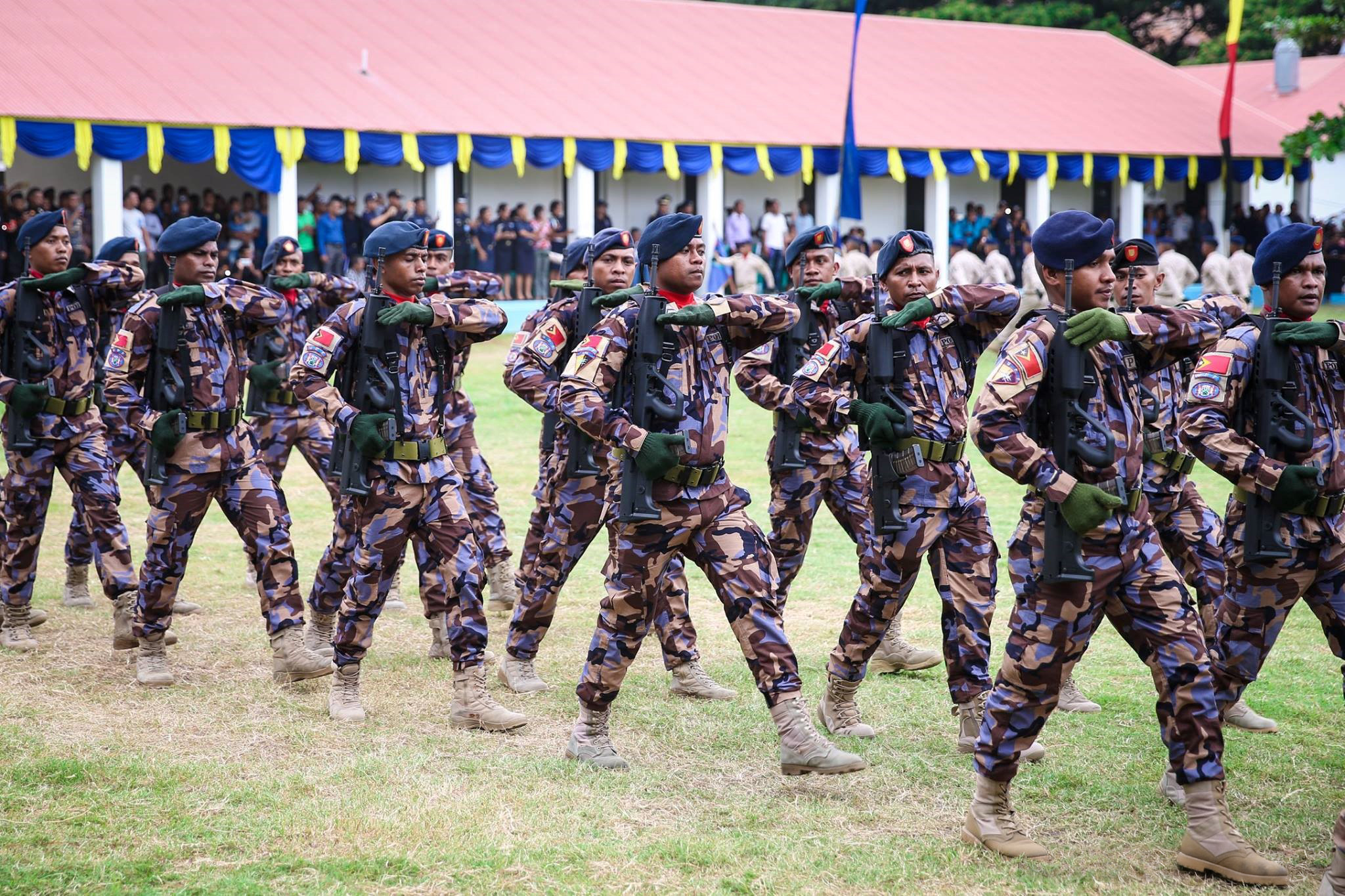 Cerimónia do 19.º Aniversário da Polícia Nacional de Timor-Leste